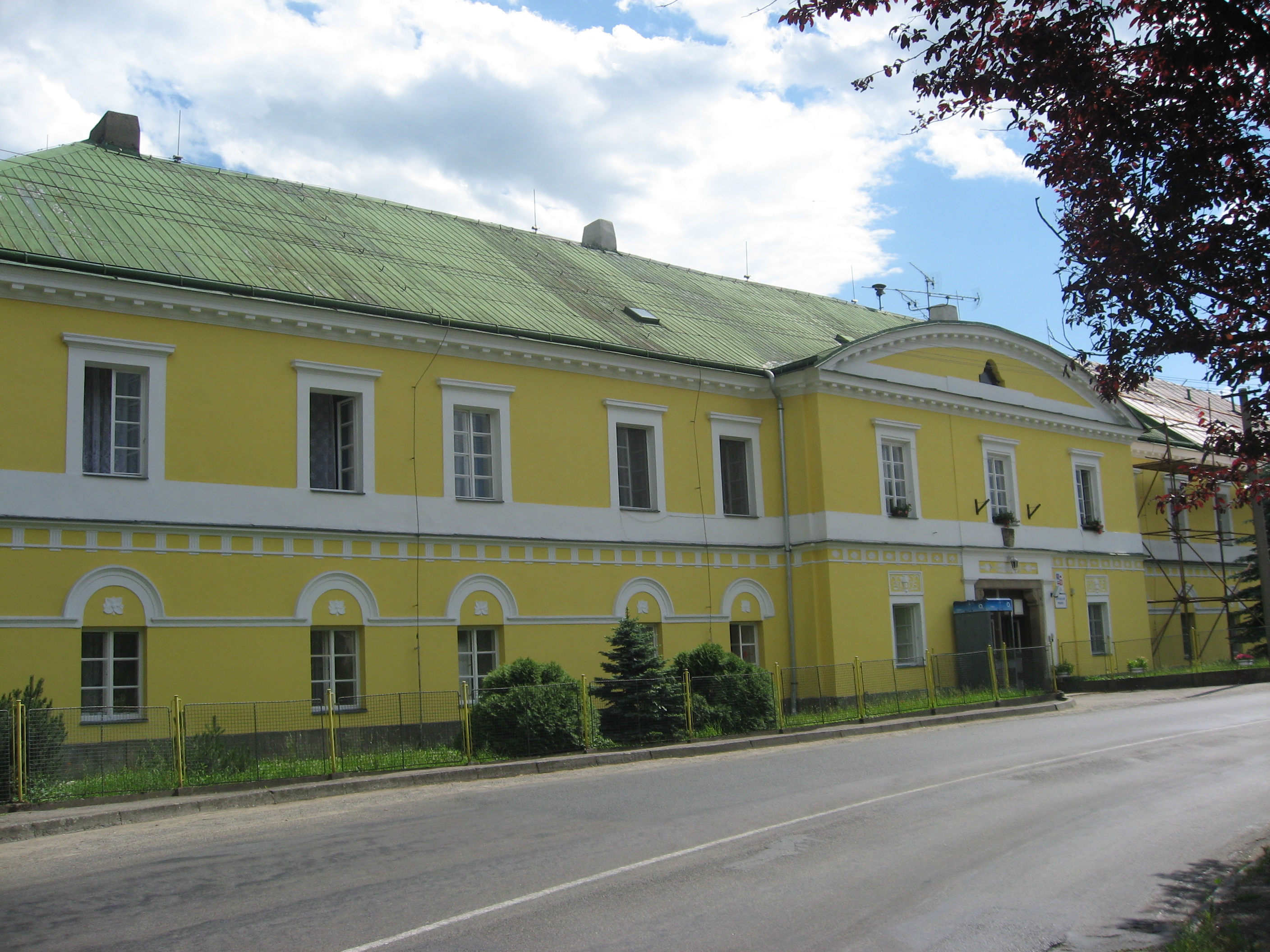 Věž, zámeček